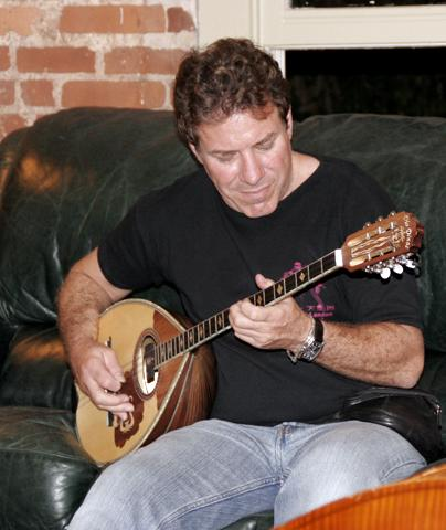 A man playing a buzuq